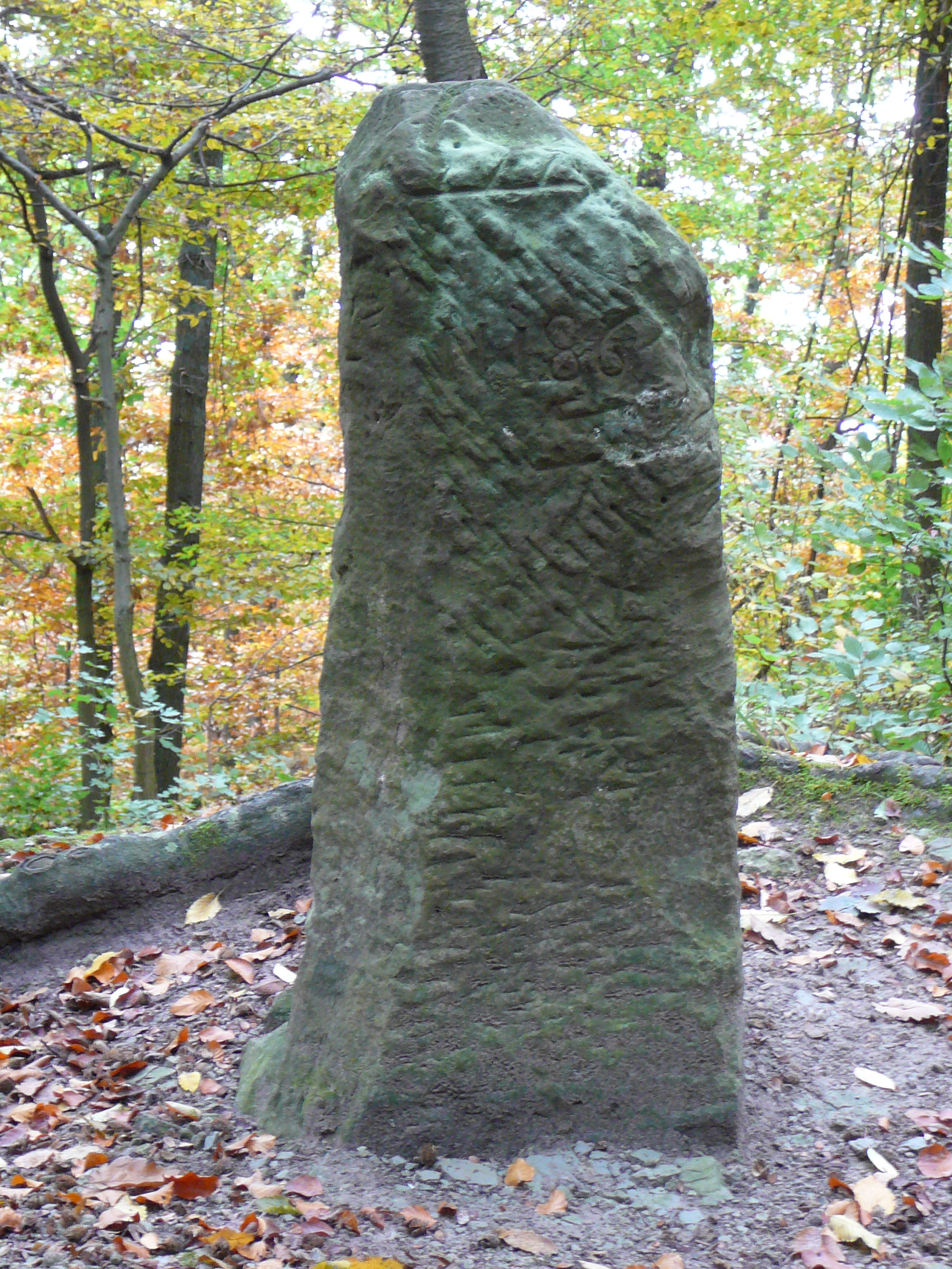 Der Schreckstein